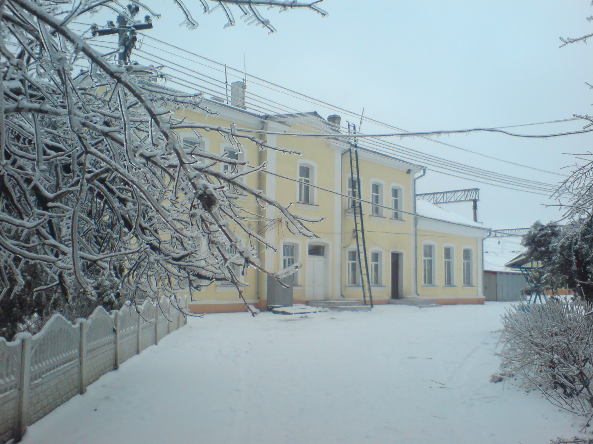 фото вокзала в Затишье